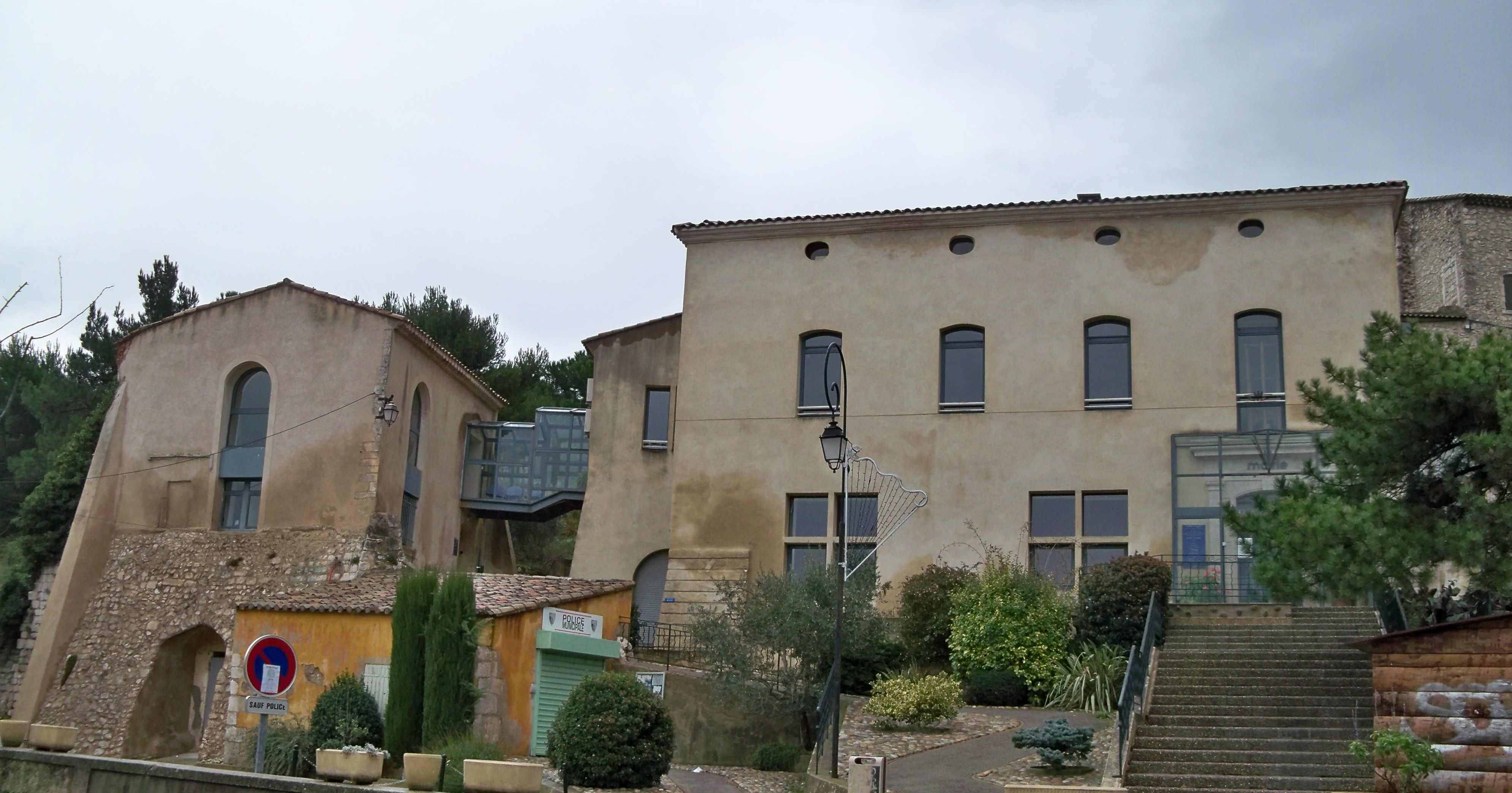 Mairie d'Orgon (13)